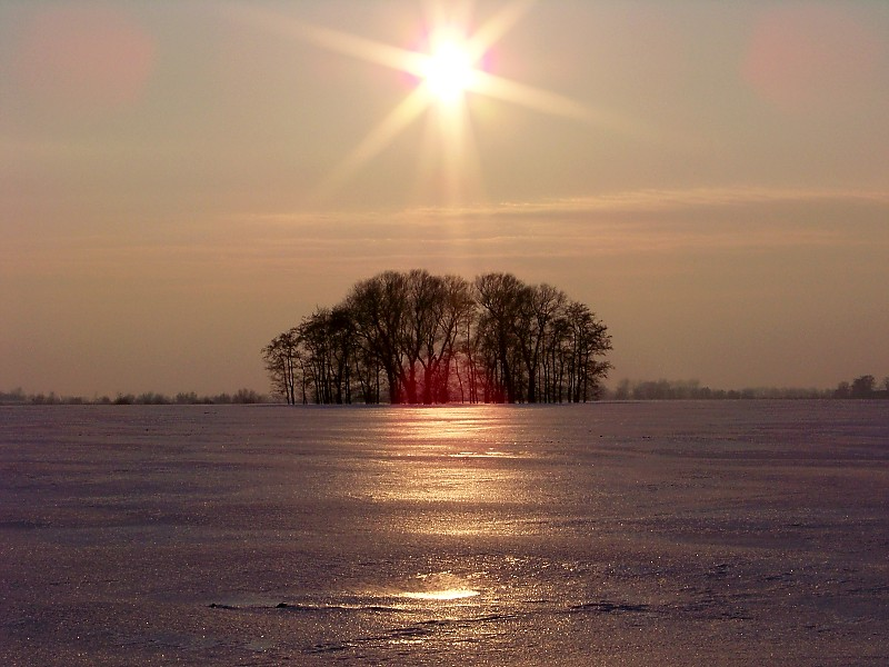 Winter auf dem Boiensdorfer Werder